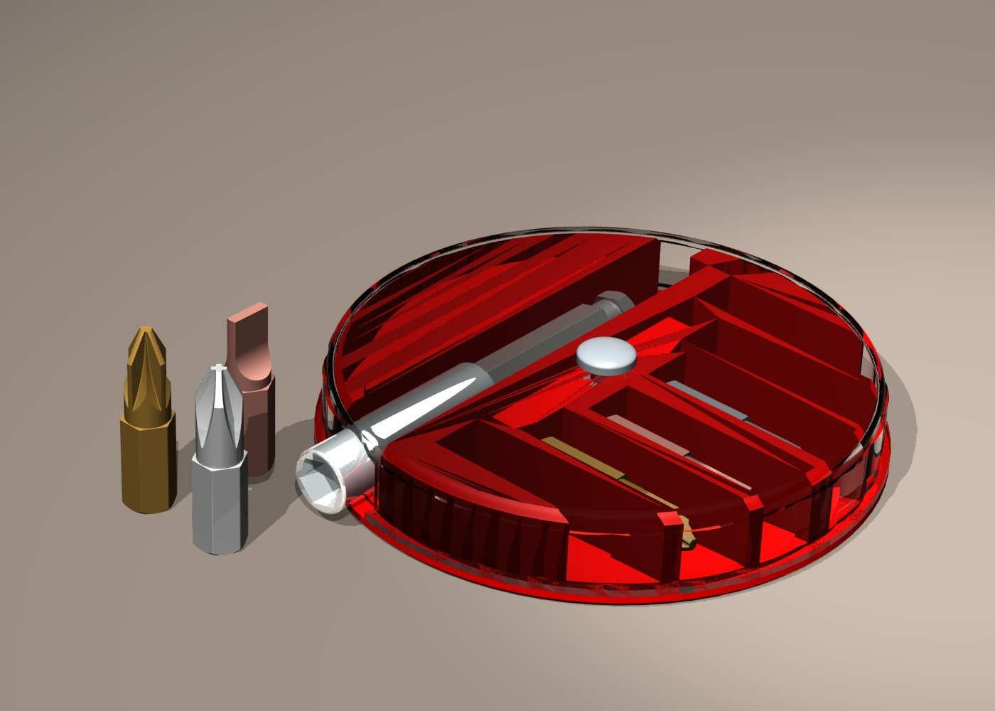 Ensemble pour visseuse, avec trois embouts (plat, cruciforme et phillips) porte-embout et boite de rangement. Image de synthèse réalisée avec SolidWorks.